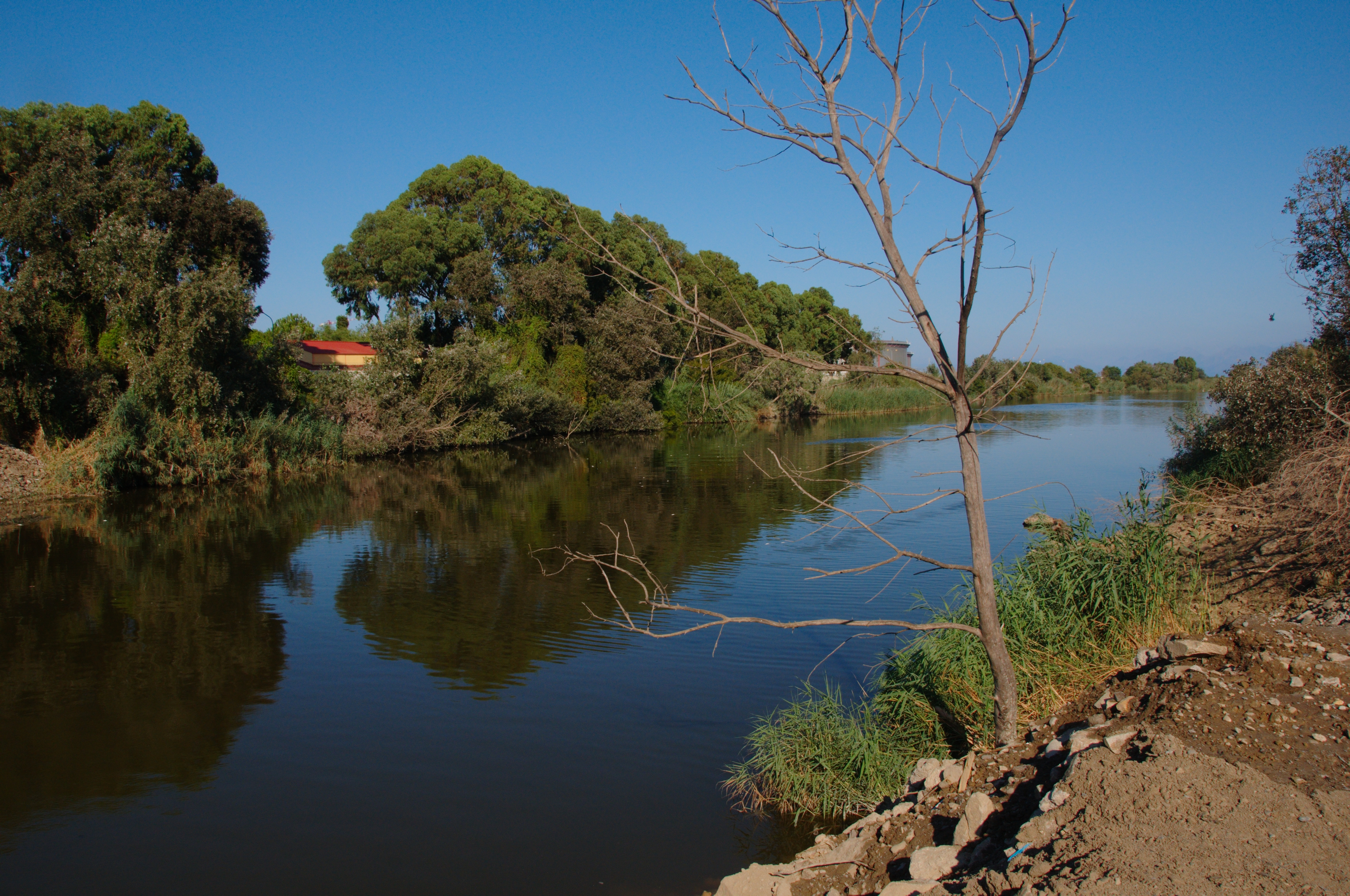 Poissons mort sur l'oued Soummam probablement une pollution aux pesticides suite à des pluies importantes